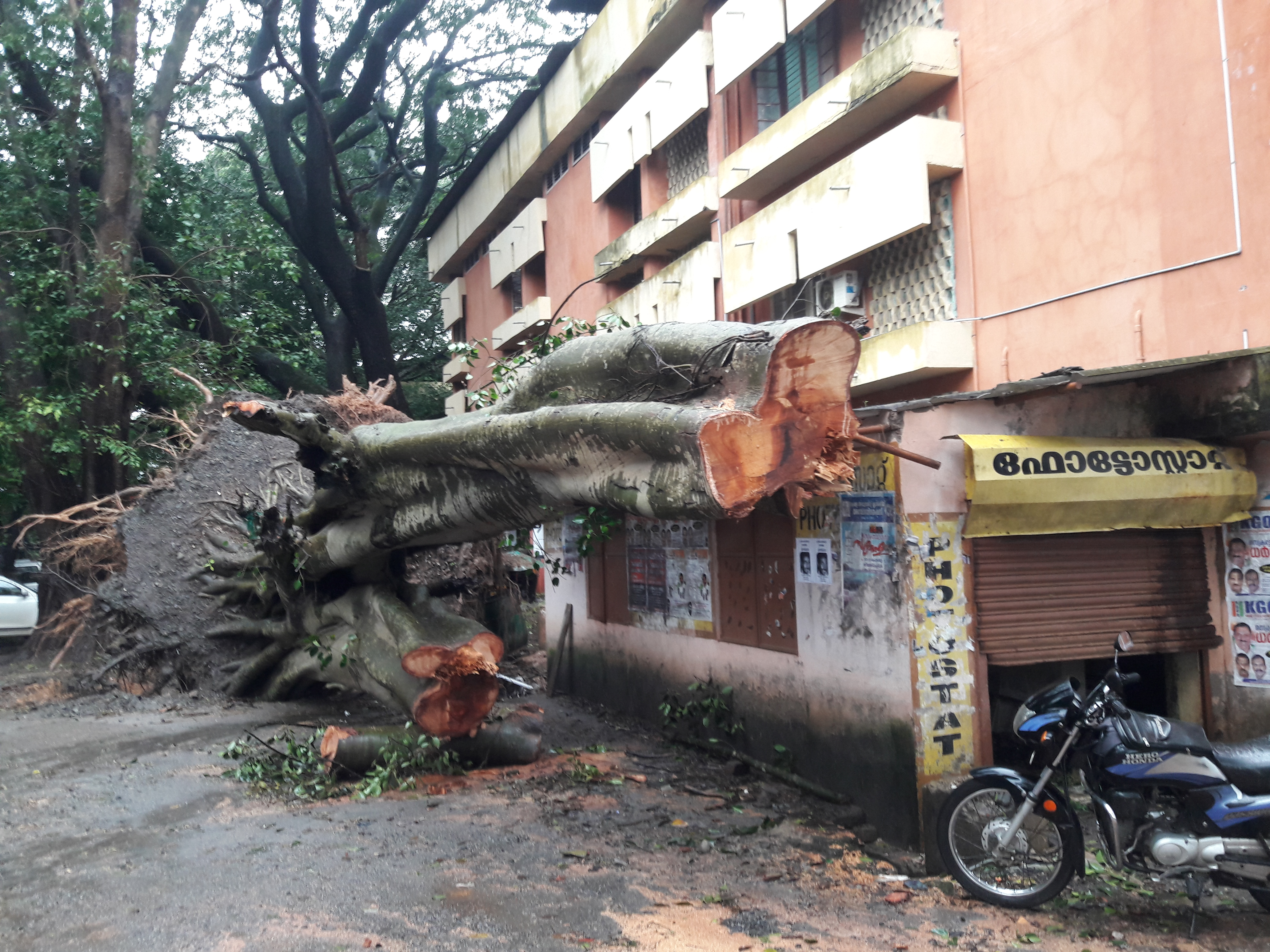 പാലക്കാട് കോടതി സമുച്ചയത്തില്‍ കാറ്റിലും മഴയത്തും കടപറഞ്ഞു വീണ ഒരു കൊയലി മരം / ചേല മരം.Indian bat tree / Indian bat fig.ശാസ്ത്രീയ നാമംFicus amplissima കുടുംബം Moraceae.